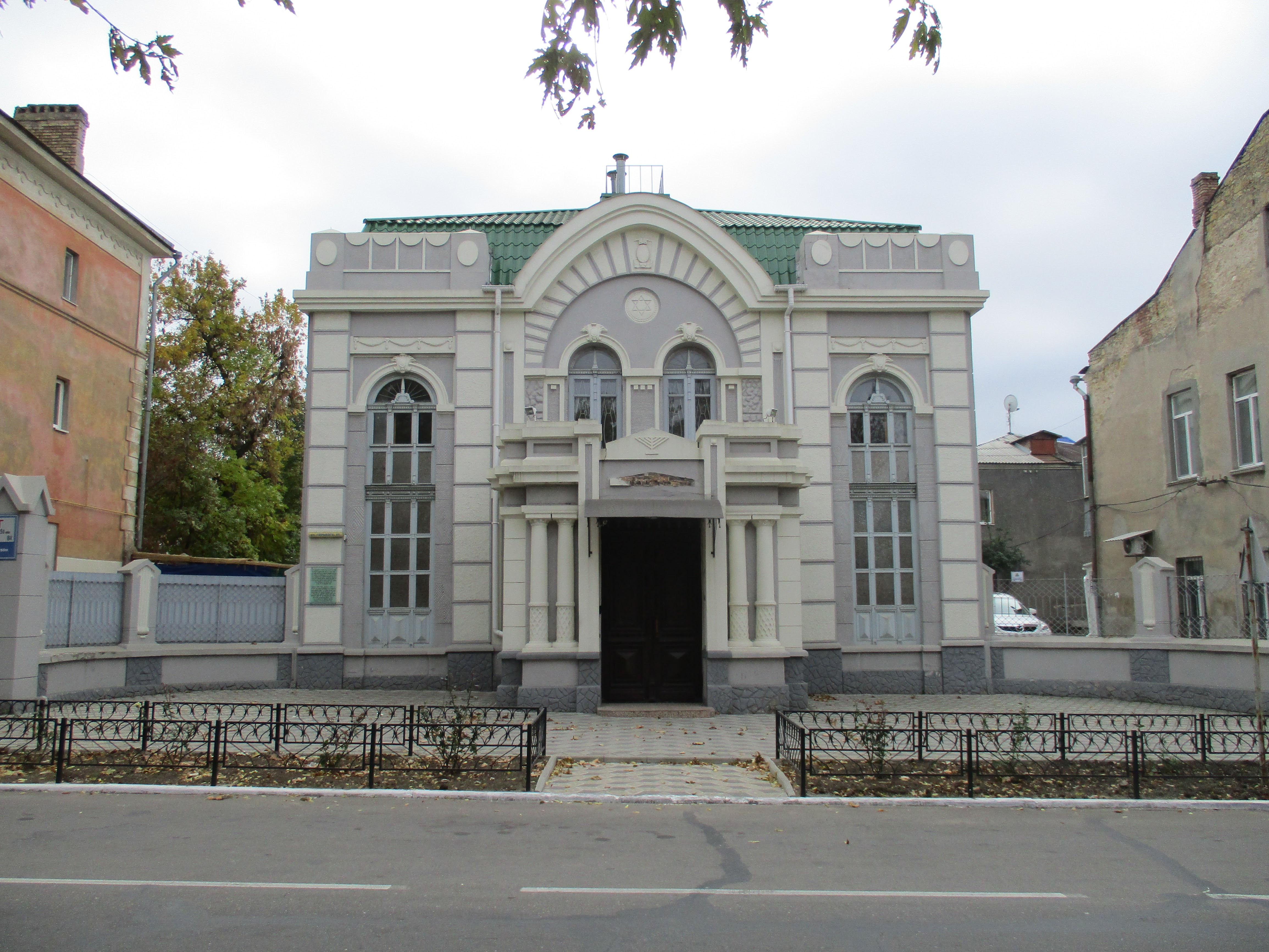 בית הכנסת המרכזי של חרסון משנת 1897 (כיום משוחזר), כיום משמש הבית כנסת של הבית חב"ד בראשות השליח לחרסון הרב יוסף יצחק וולף